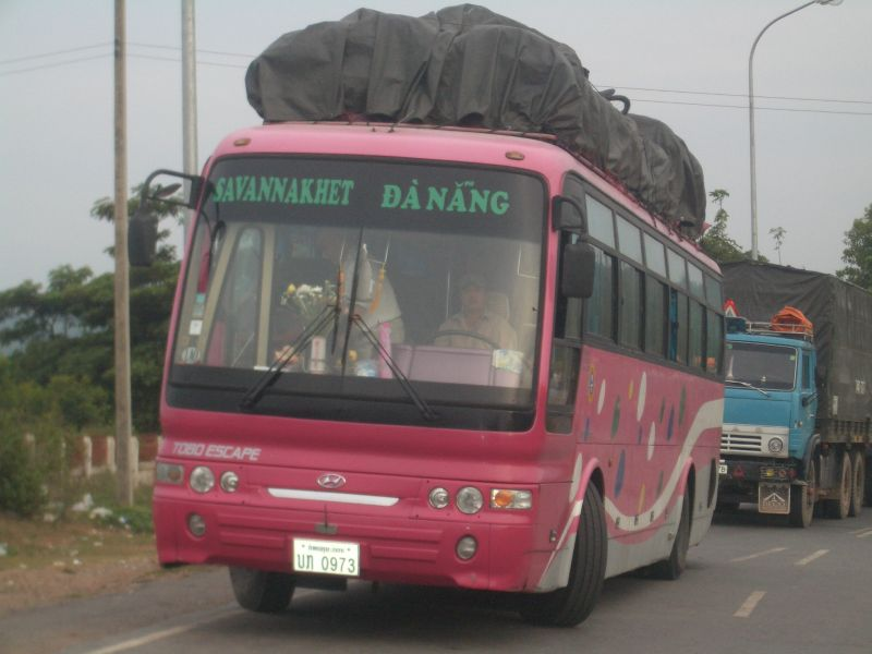 Bus from Sawanaket, Laos to Danang Vietnam